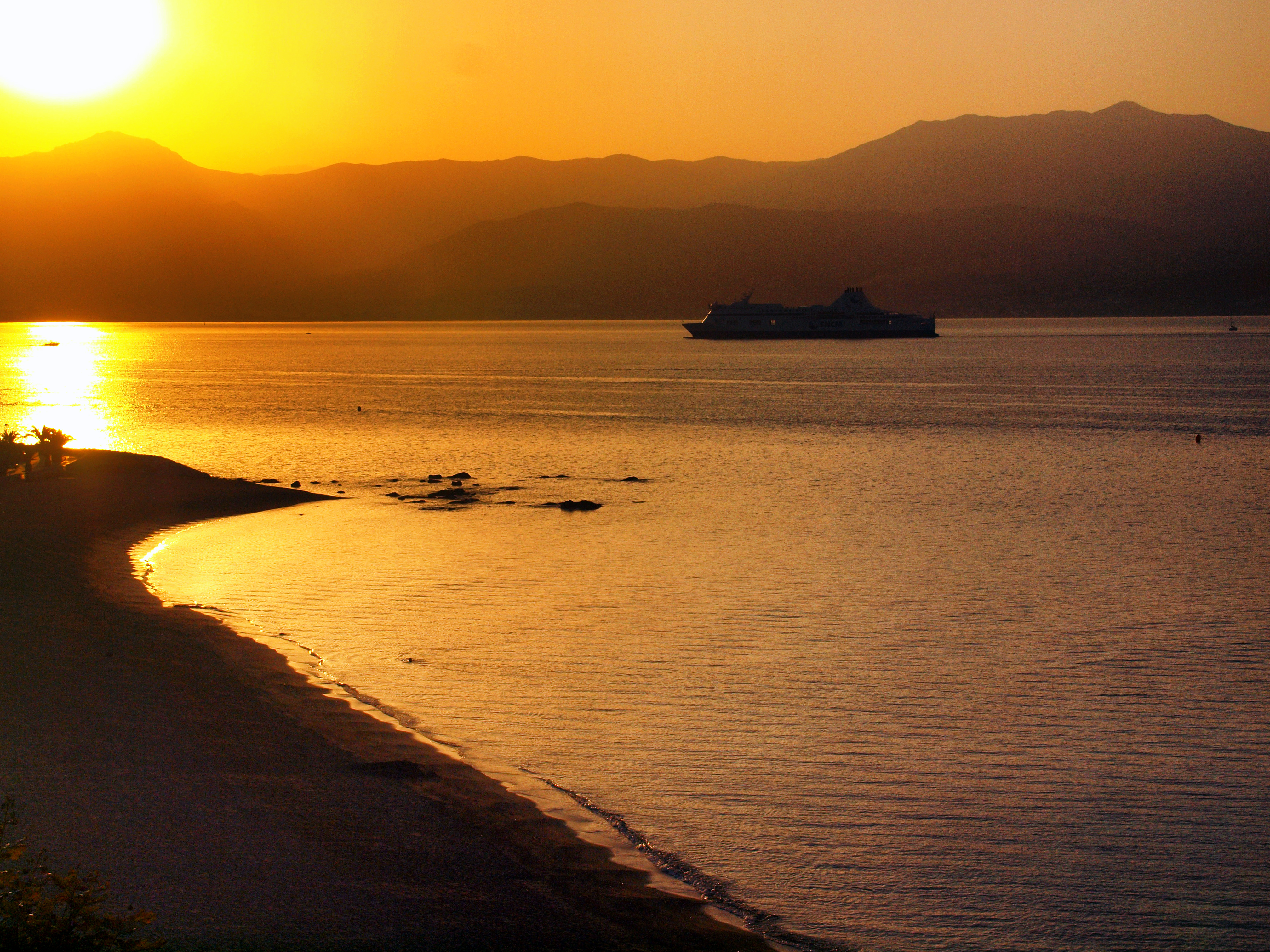 Ajaccio (Corse) - Arrivée dans le golfe d'un navire de la SNCM au lever